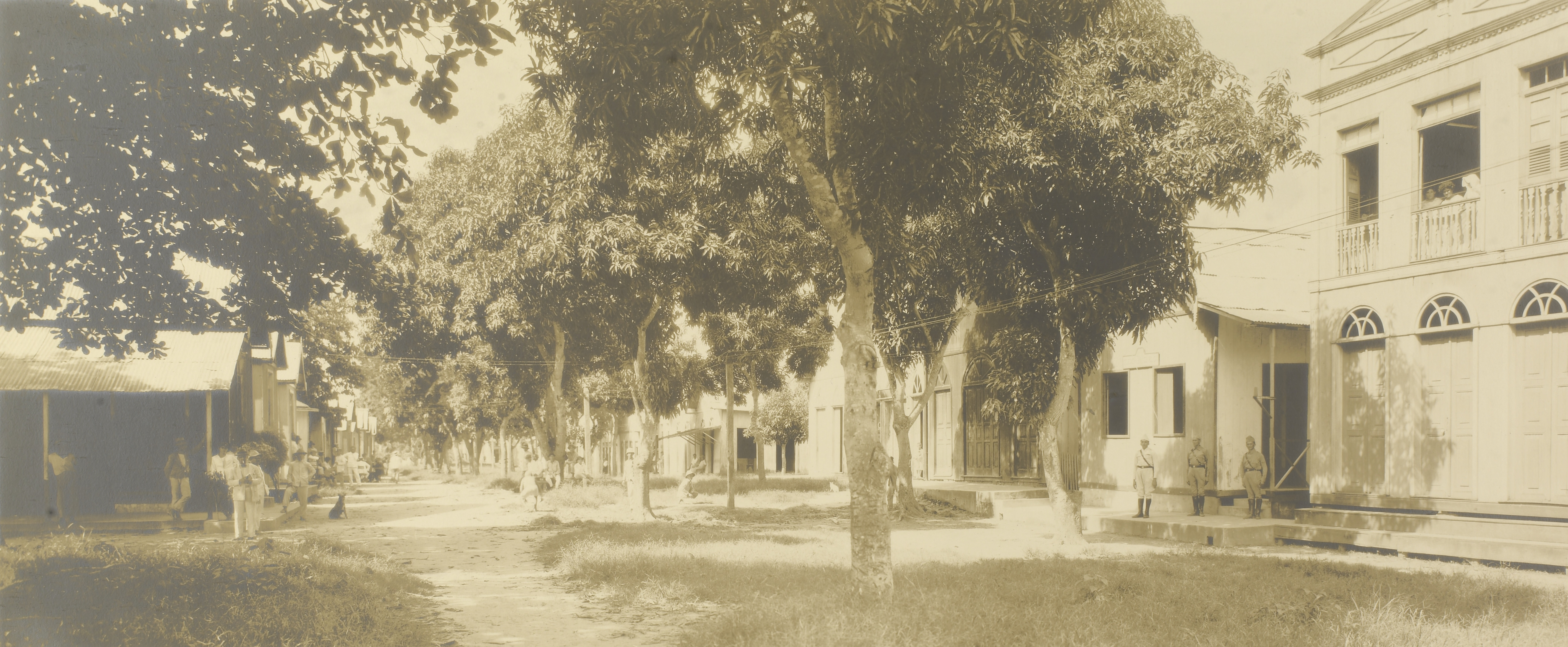 Imagem do Fundo Ministério da Guerra, do Arquivo Nacional